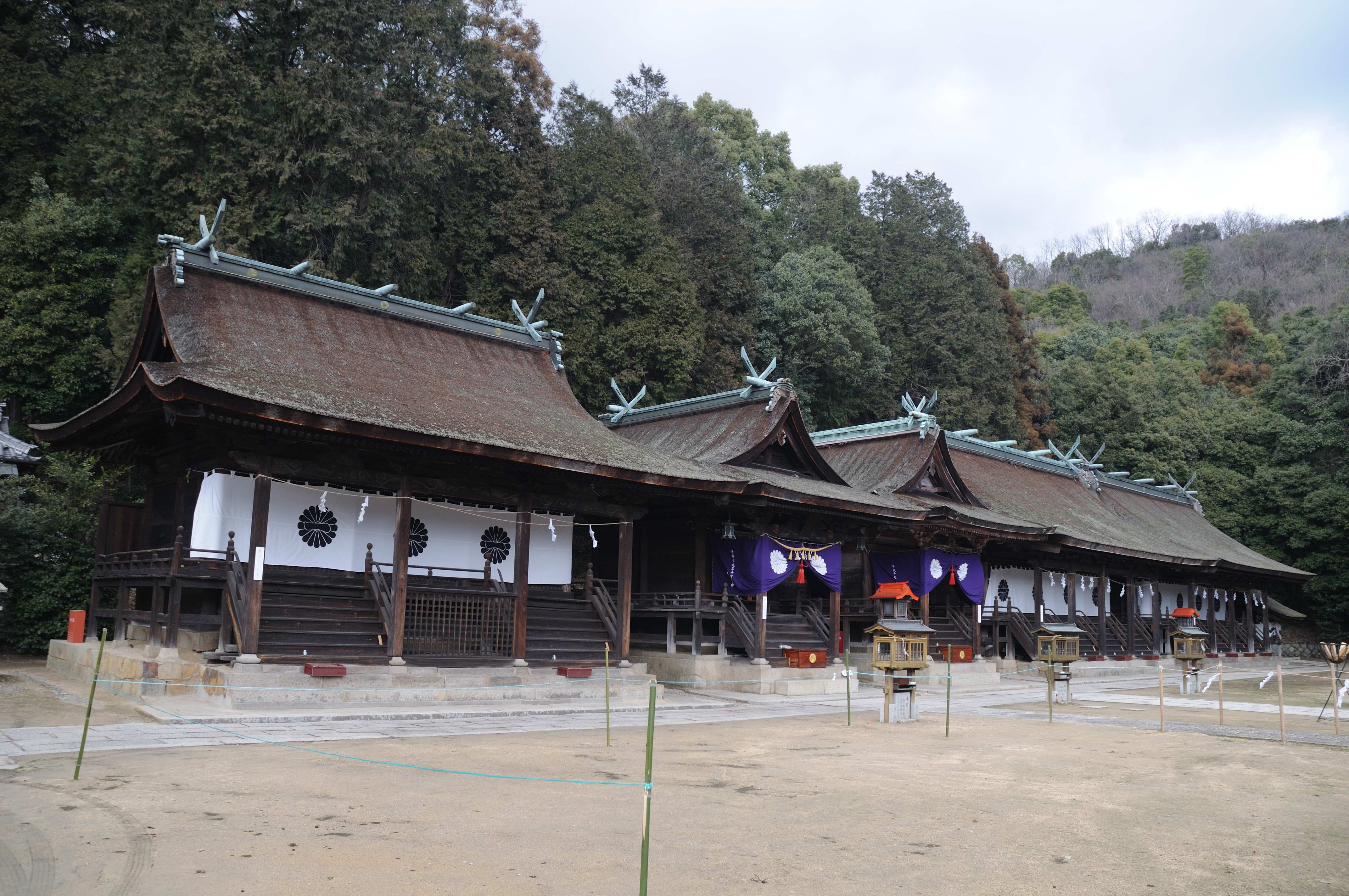 Main shrine